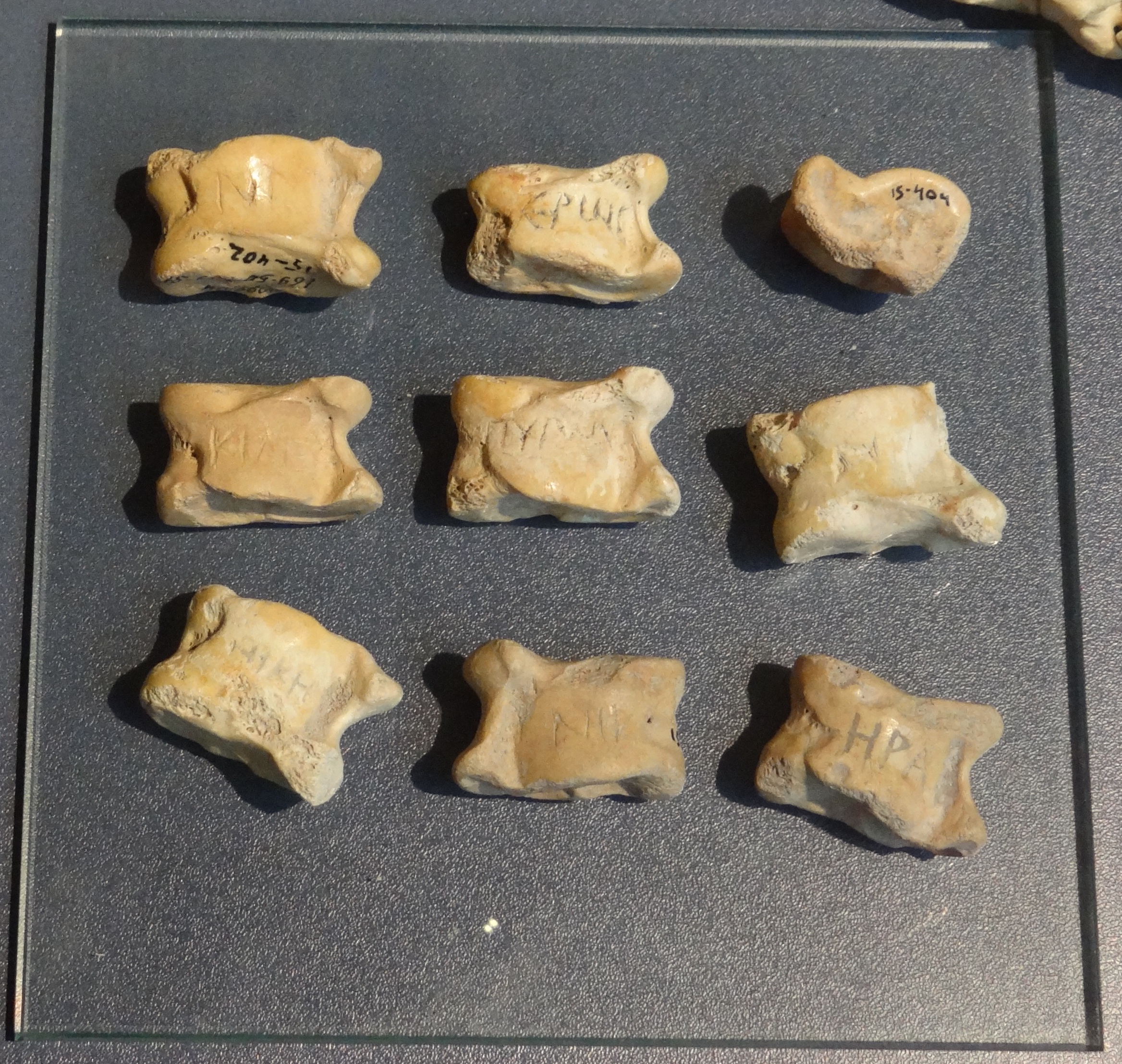 אסטרגלים ועליהם חרות שמה של ניקה שנמצאו במרשה המאות ה-2-2 לפני הספירה התקופה ההלניסטית